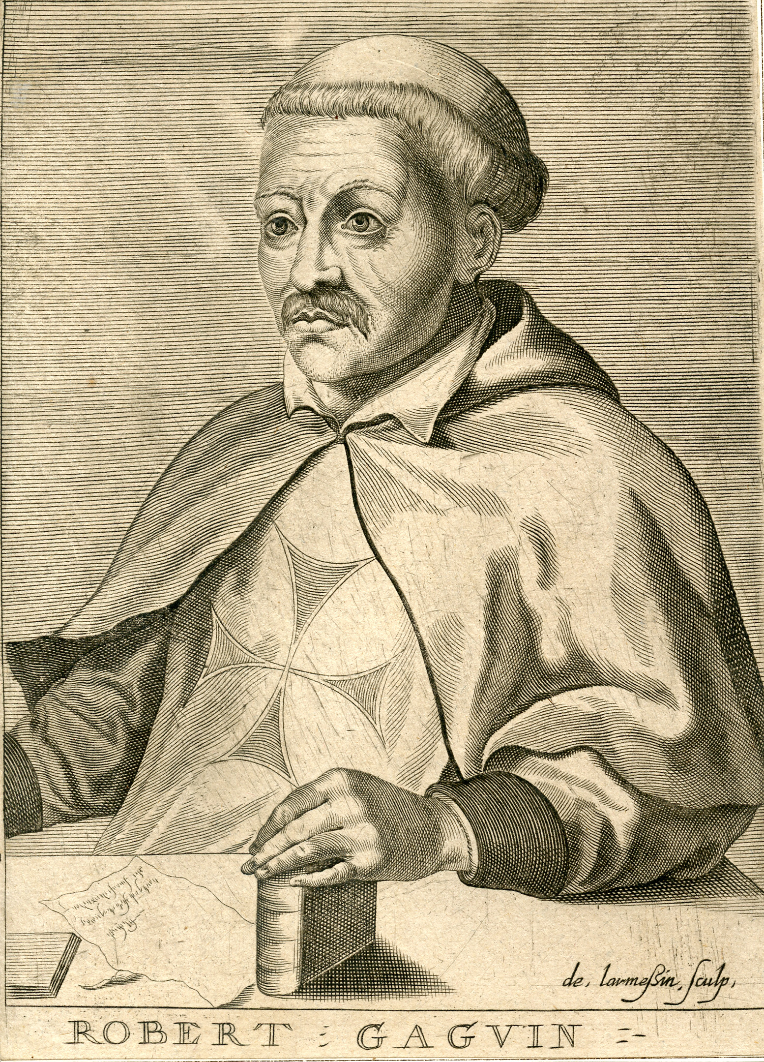 Gravure de Robert Gaguin (1433-1501) par Nicolas III de Larmessin (1684-1755).